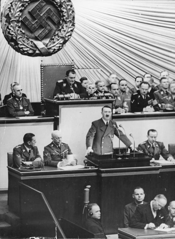 Berlin, Reichstagssitzung, Rede Adolf Hitler Die große Rede des Führers in der Reichstagssitzung vom 6. Oktober 1939. Auf der Ministerbank von rechts nach links: Die Reichsminister Rudolf Heß und von Ribbentrop, Großadmiral Raeder, die Reichsminister Dr. Frick und Dr. Goebbels, Reichsprotektor Frhr. von Neurath. In der 2. Reihe: die Reichsminister Graf Schwerin-Krosigk, Funk, Dr. Gürtner, Darré, Rust, Kerrl, Seldte, Dr. Frank. In der 3. Reihe: Die Reichsminister Dr. Ohnesorge, Dr. Seyss-Inquart, Generaloberst von Brauchitsch, Generaloberst Keitel, die Staatsminister Dr. Meissner und Prof. Popitz. 6.10.39. Abgebildete Personen: Hitler, Adolf: Reichskanzler, Deutschland Göring, Hermann: Reichsmarschall, Oberbefehlshaber der Luftwaffe, Ministerpräsident von Preußen, Deutschland English translation of original title: The Leader's great speech of October 6, 1939, before the convened Reichstag. On the ministry bench from right to left: Reichsministers Rudolf Hess and von Ribbentrop, Grand Admiral Raeder, Reichministers Dr. Frick and Dr. Goebbels, Reich Protector Freiherr von Neurath. In the second row: Reichministers Graf Schwerin-Krosigk, Funk, Dr.Dr. Gürtner, Darré, Rust, Kerrl, Seldte, Dr. Frank. In the third row: Reichministers Dr. Ohnesorge, Dr. Seyss-Inquart, Colonel General von Brauchitsch, Colonel General Keitel, and State Ministers Dr. Meissner and Prof. Popitz. 10/6/39 Persons also depicted: Hitler, Adolf: Reich Chancellor, Germany. Göring, Hermann: Reichsmarschall, Supreme Commander of the Luftwaffe, Presiding Minister, Prussia, Germany.